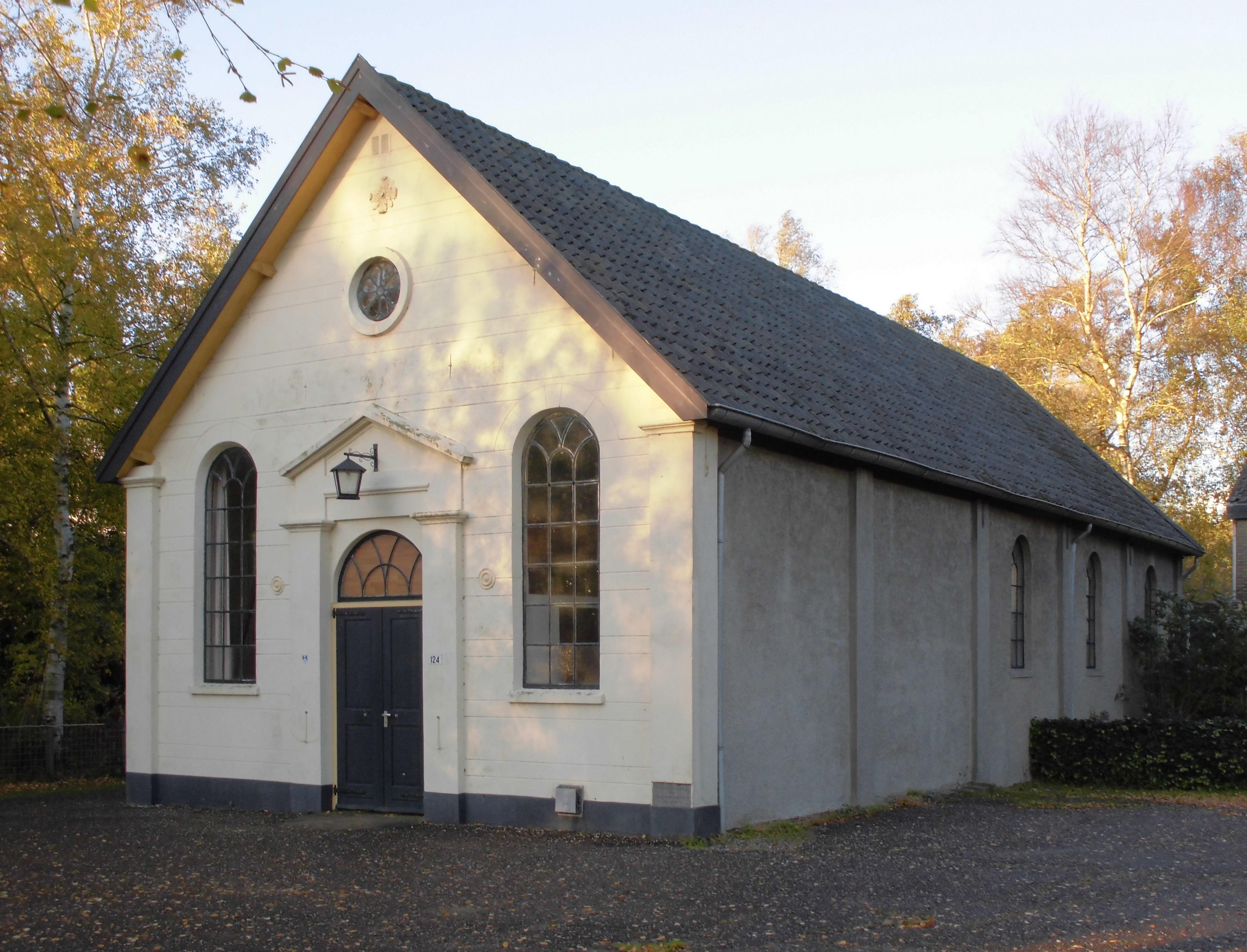 Ned Gereformeerde Kerk Oud Loosdrecht